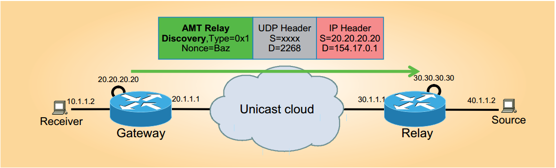 Relay Discovery message